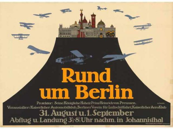 Berliner Werbeplakat, 1912